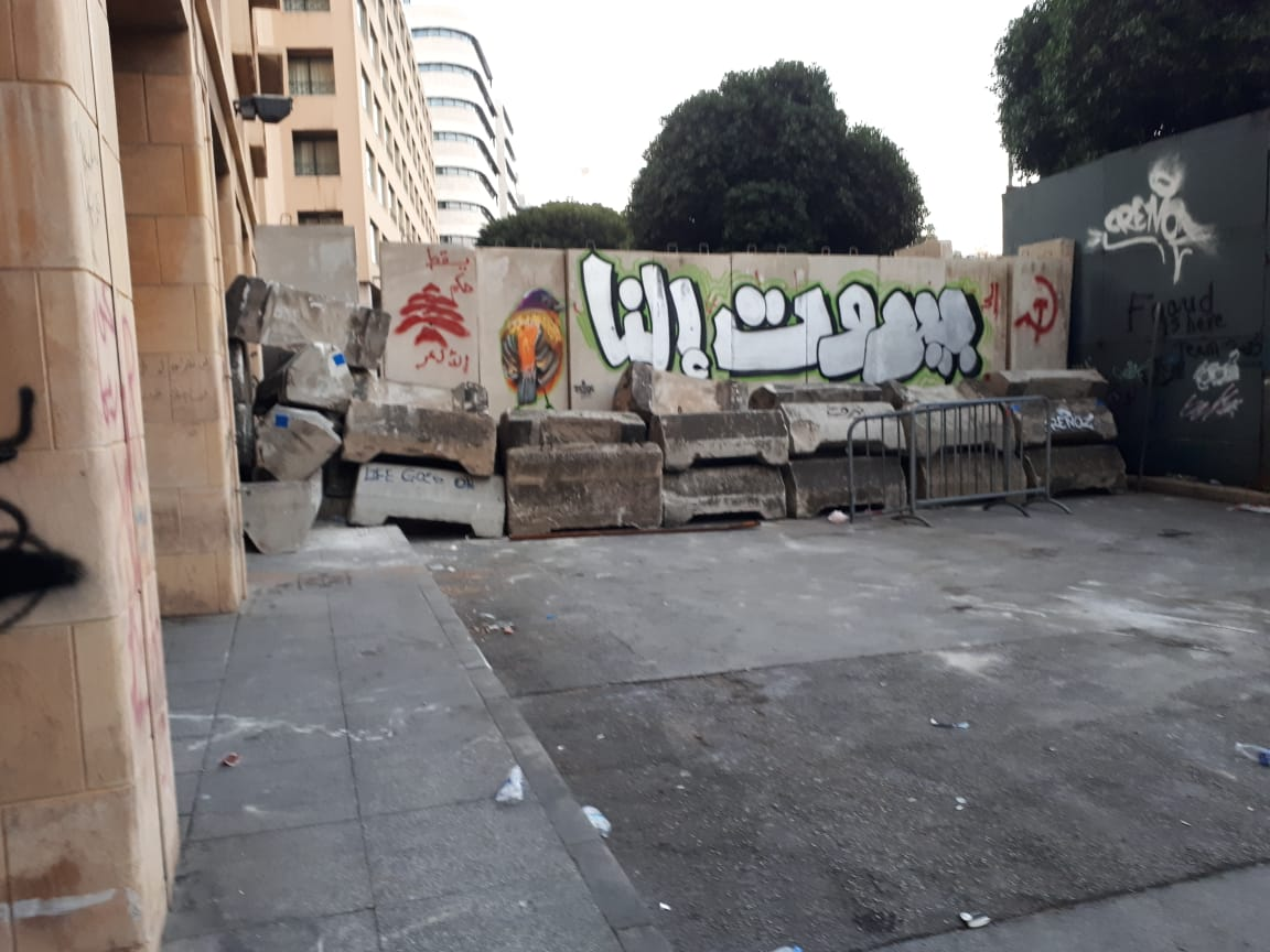 Mauerinschrift bei den Protesten in Beirut, Dezember 2019